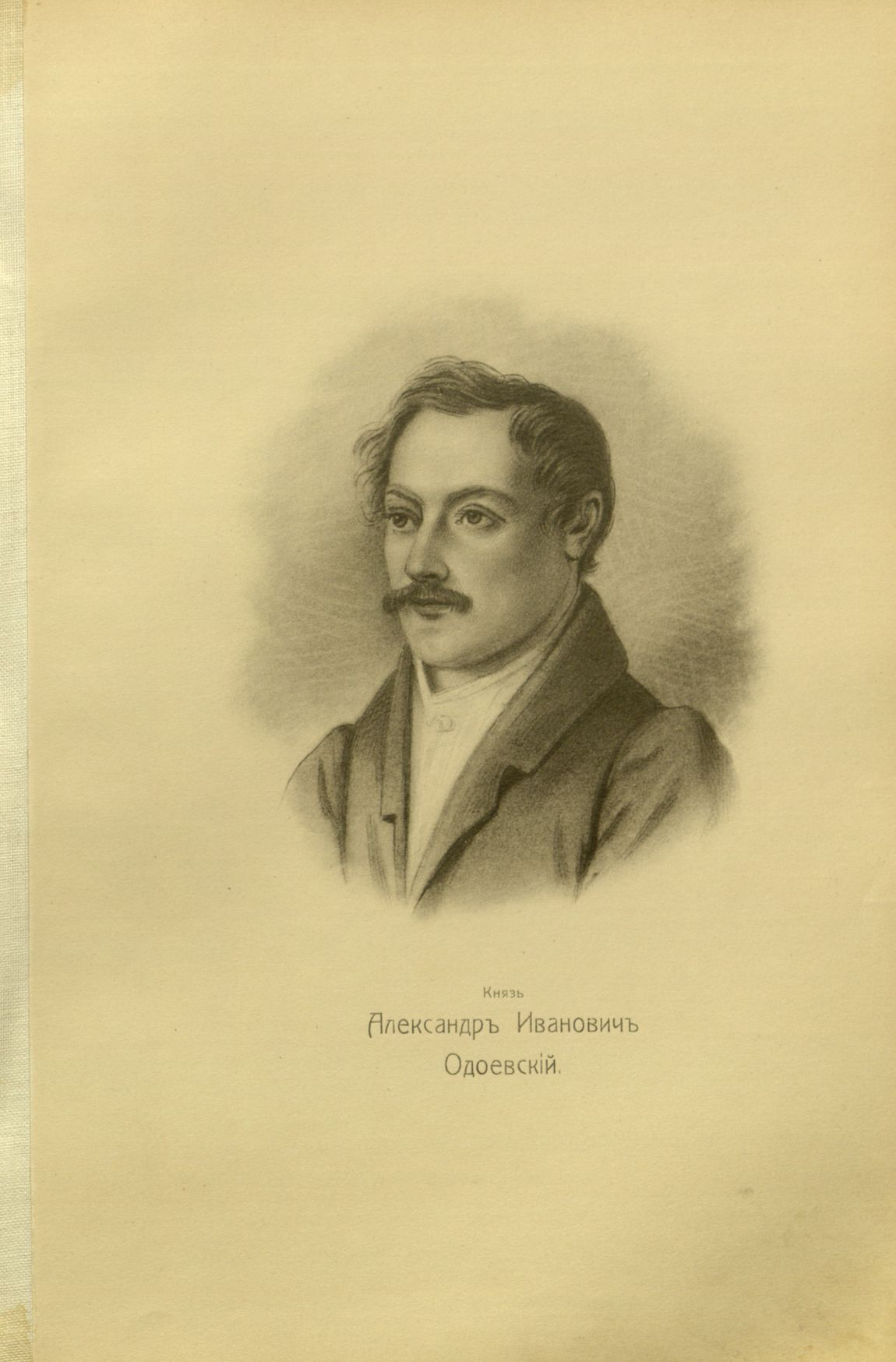 Alexander Odoyevsky